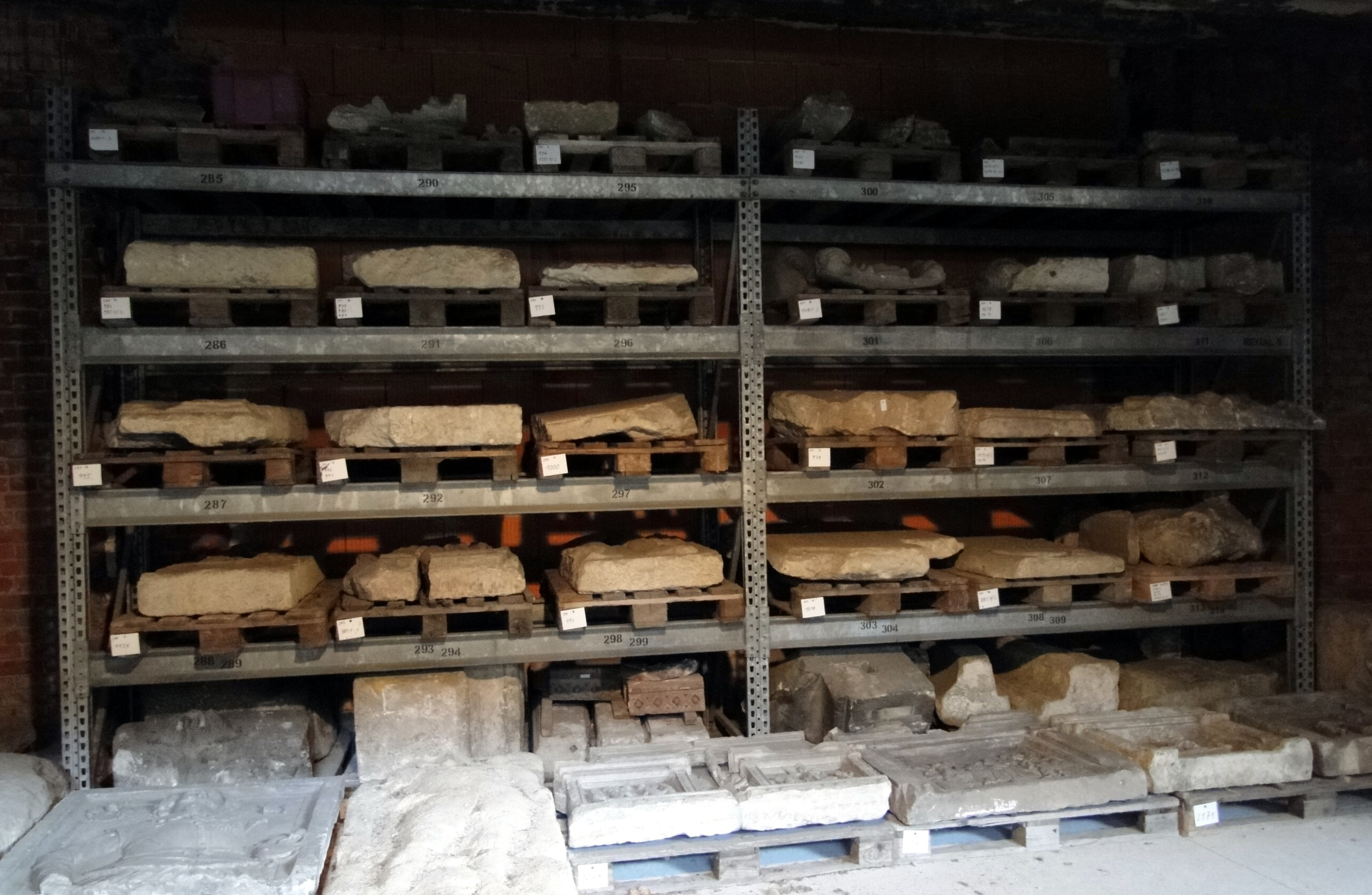 Gelagerte Grabsteine vom Frauenkirchhof Dresden im Lapidarium Zionskirche in der Dresdner Südvorstadt; die Grabsteine wurden im Bährschen Frauenkirchbau als Steinmaterial verwendet und bei der Enttrümmerung der Kirche 1994/1995 geborgen